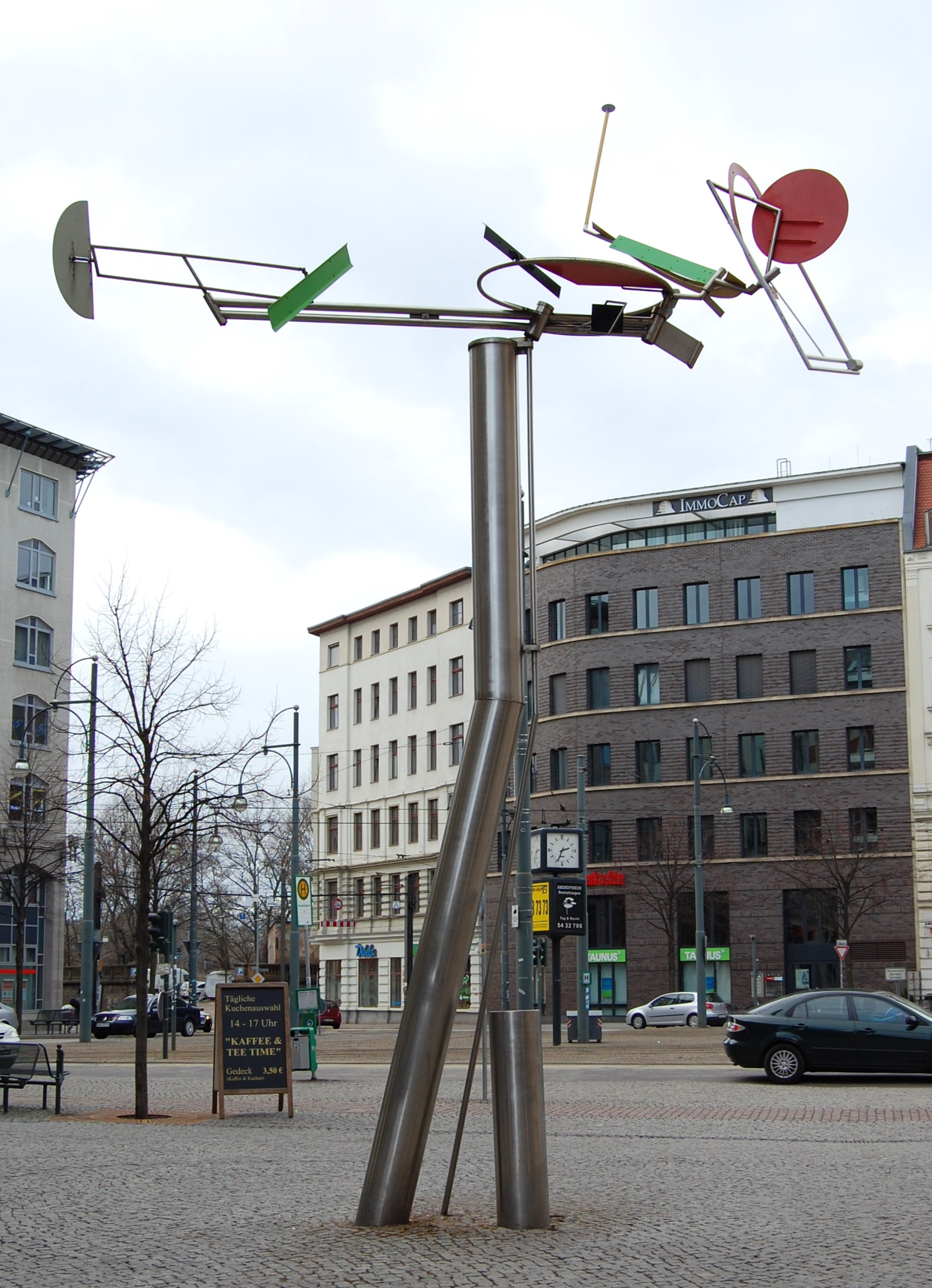 Kunstwerk Aerobiont I von Jörg-Tilmann Hinz in Magdeburg am Hasselbachplatz